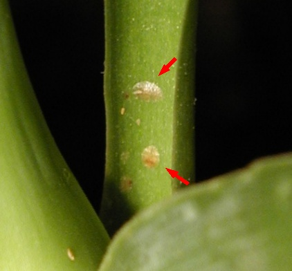 Schildlaus